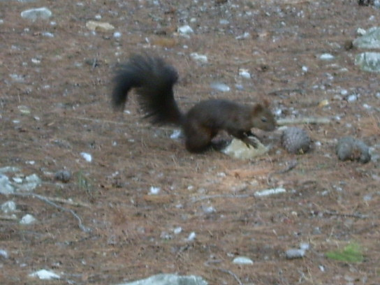 Sciuro en Primoŝteno Sciuro sur la antaŭa E-feriejo ĉe Primoŝten (memfarita foto libere uzebla)